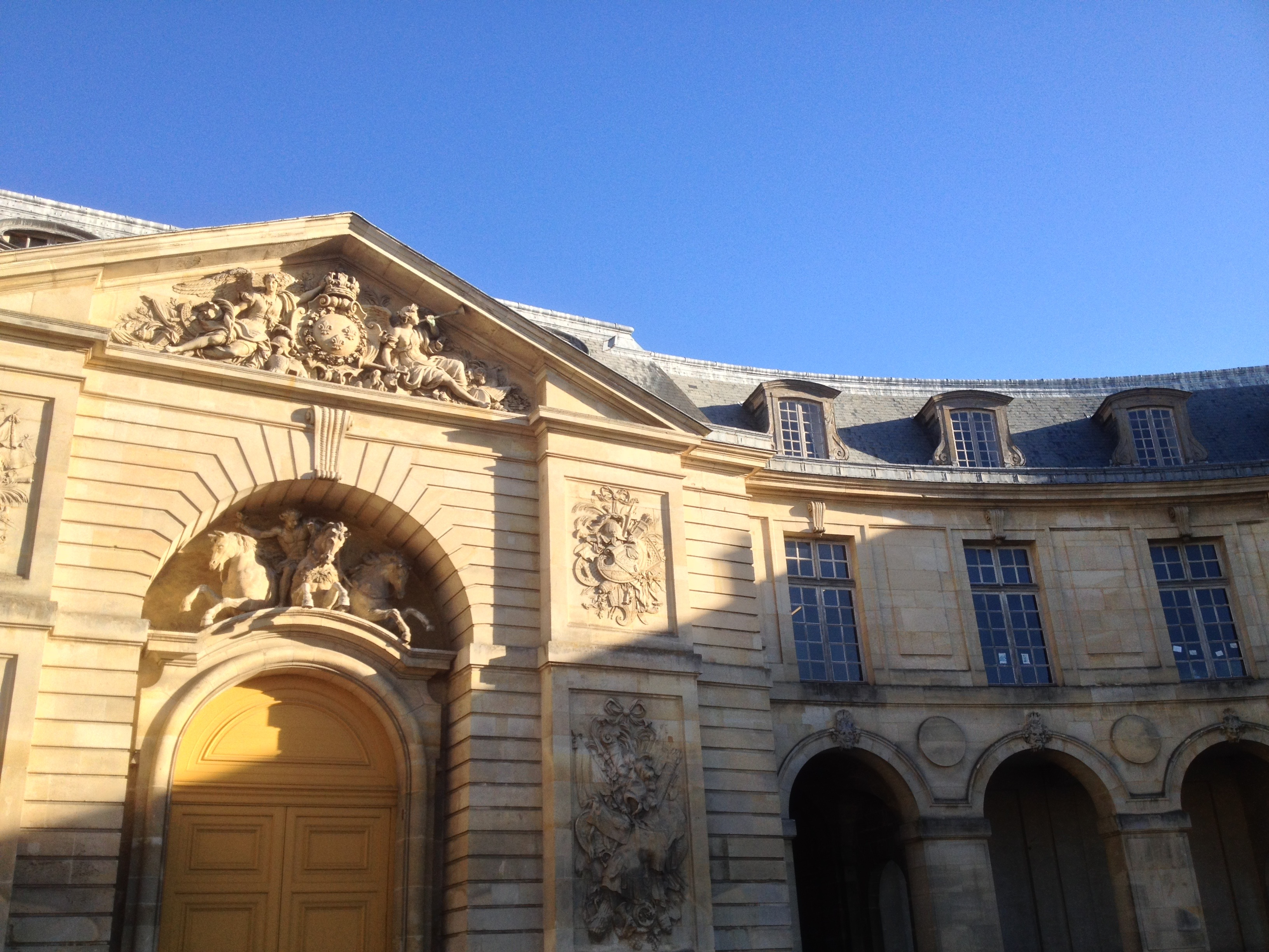 la façade de la Petite Ecurie à Versailles